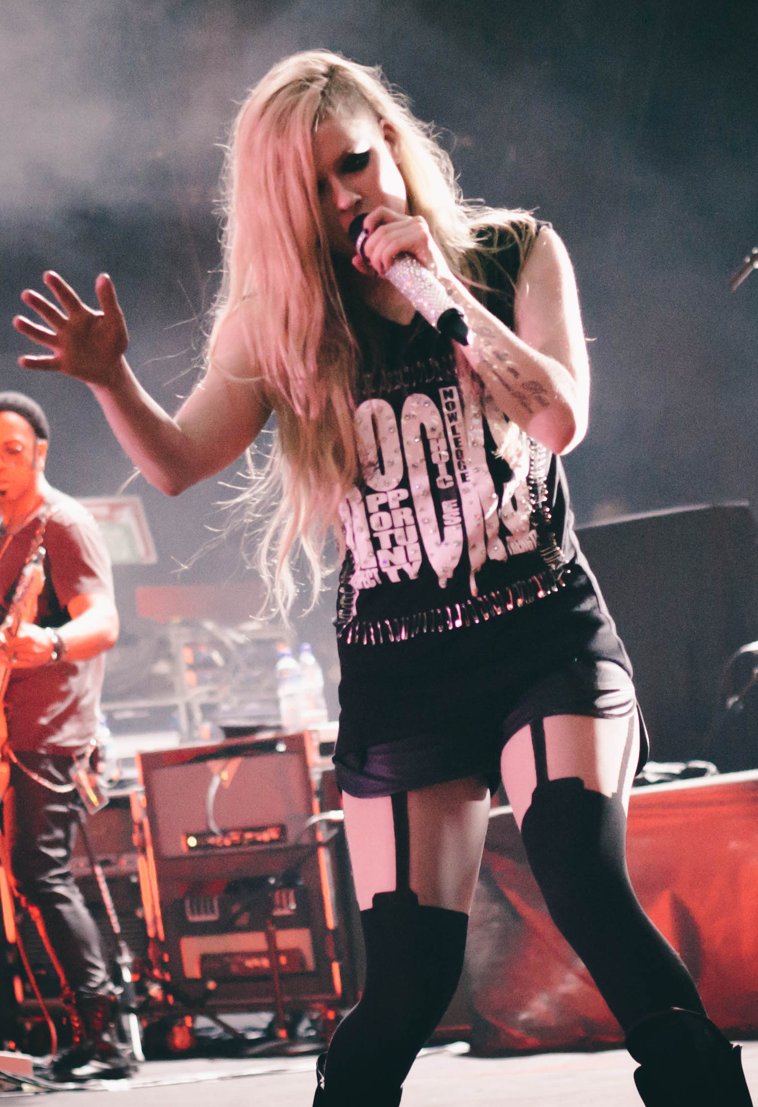 Avril Lavigne in Brasilia, Brazil in The Avril Lavigne Tour